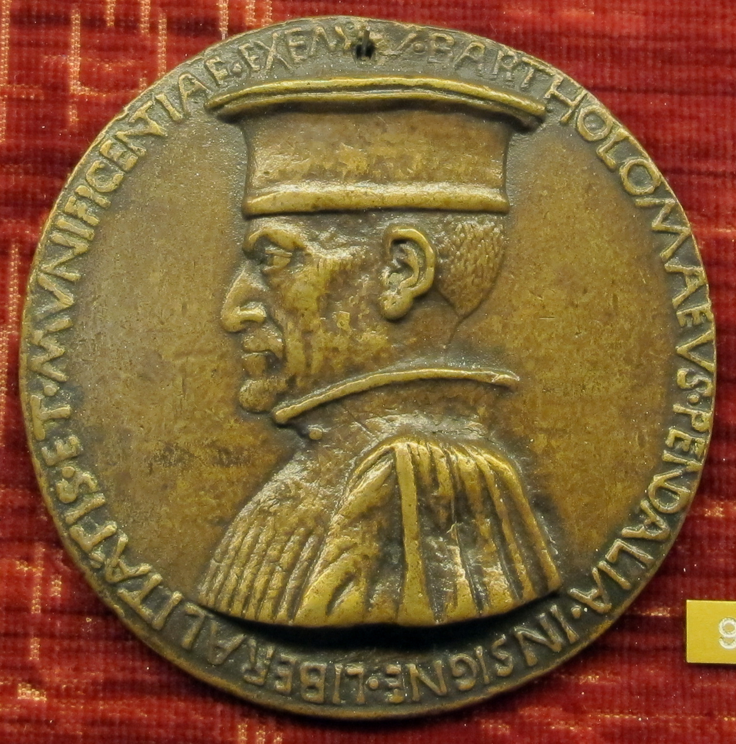 Medaglia di Bartolomeo Pendaglia, mercante ferrarese